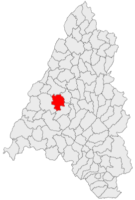 Categorie:Hărţi ale judeţului Bihor